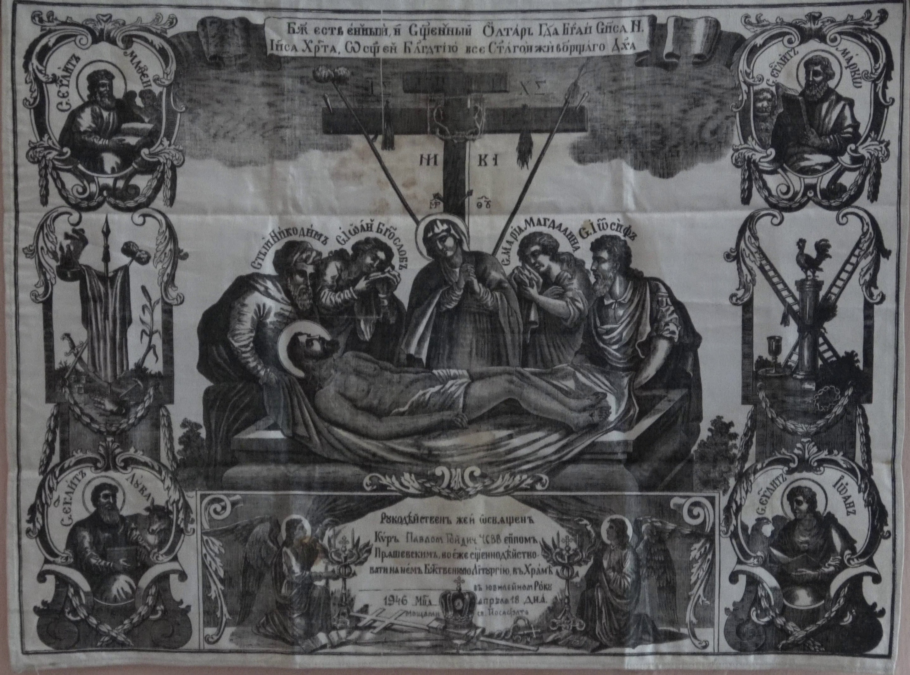 Antimins řeckokatolický z roku 1946. Photo taken by Jozafát Vladimír Timkovič, OSBM